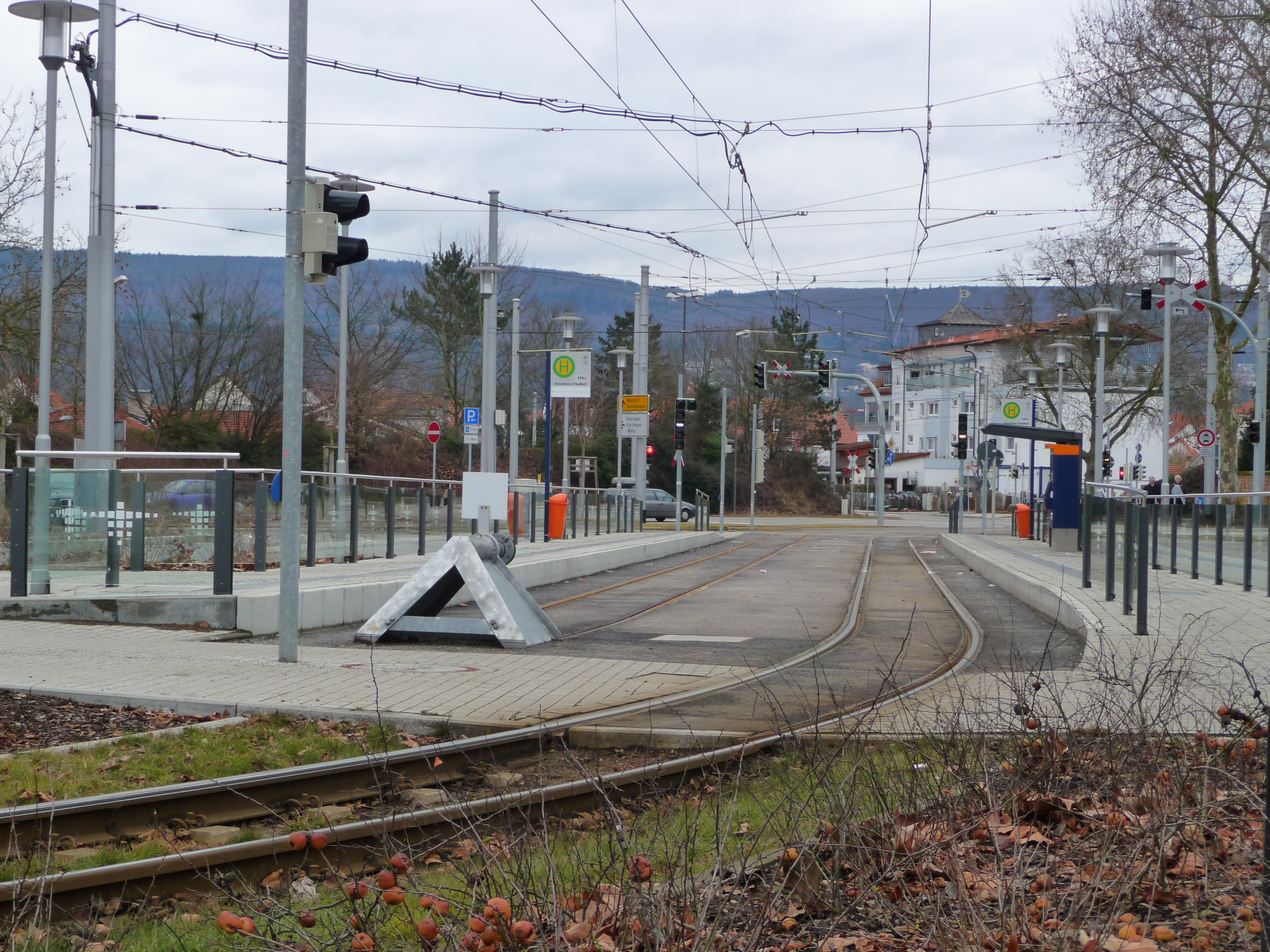 Konečná stanice tramvaje v Heidelberg-Kirchheimu